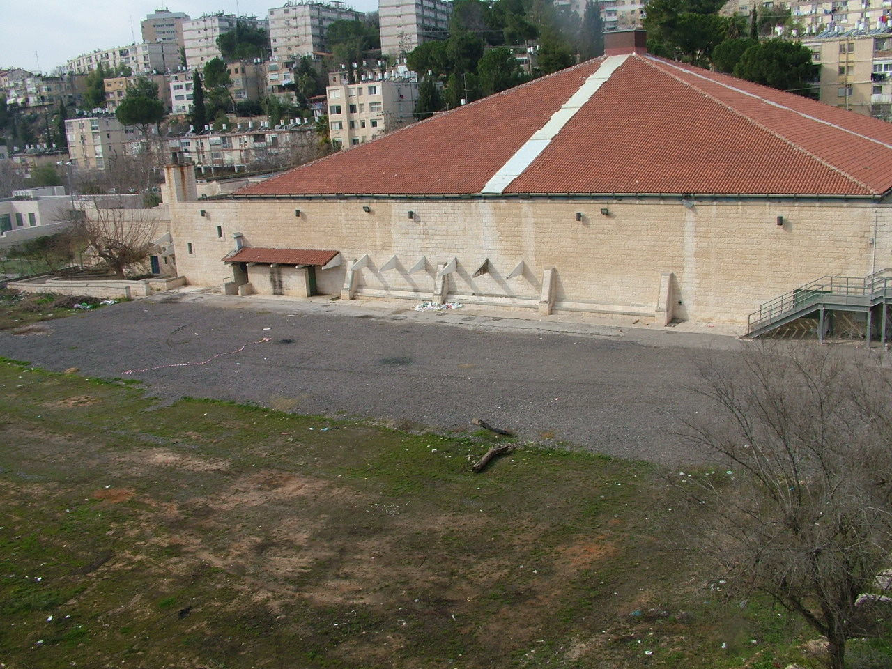 Malha hall (Hapoel Jerusalem field in basketball), Jerusalem, Israel